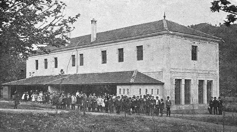 Escolas da Fundación Benigno Quiroga, Punxín, fotografía en Vida Gallega 1924